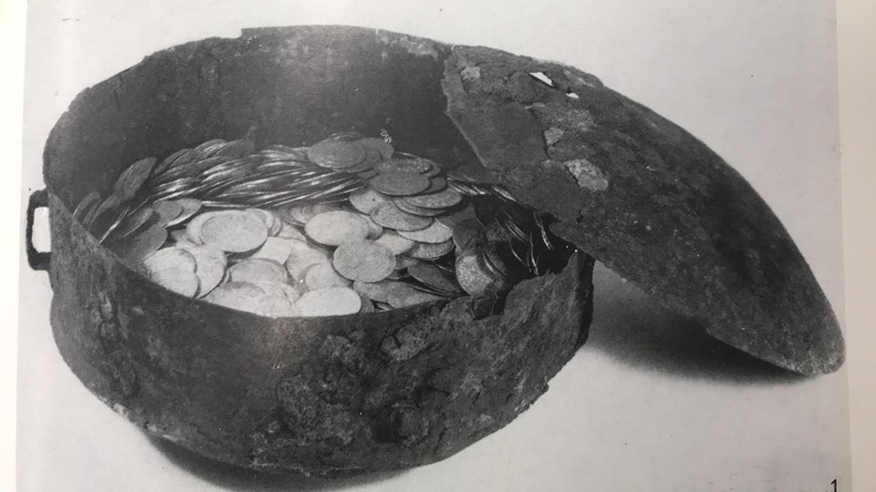 Nález pražských grošů v Praze. Zdroj: Em. Nohejlová-Prátová, Základy numismatiky, Tab. 39